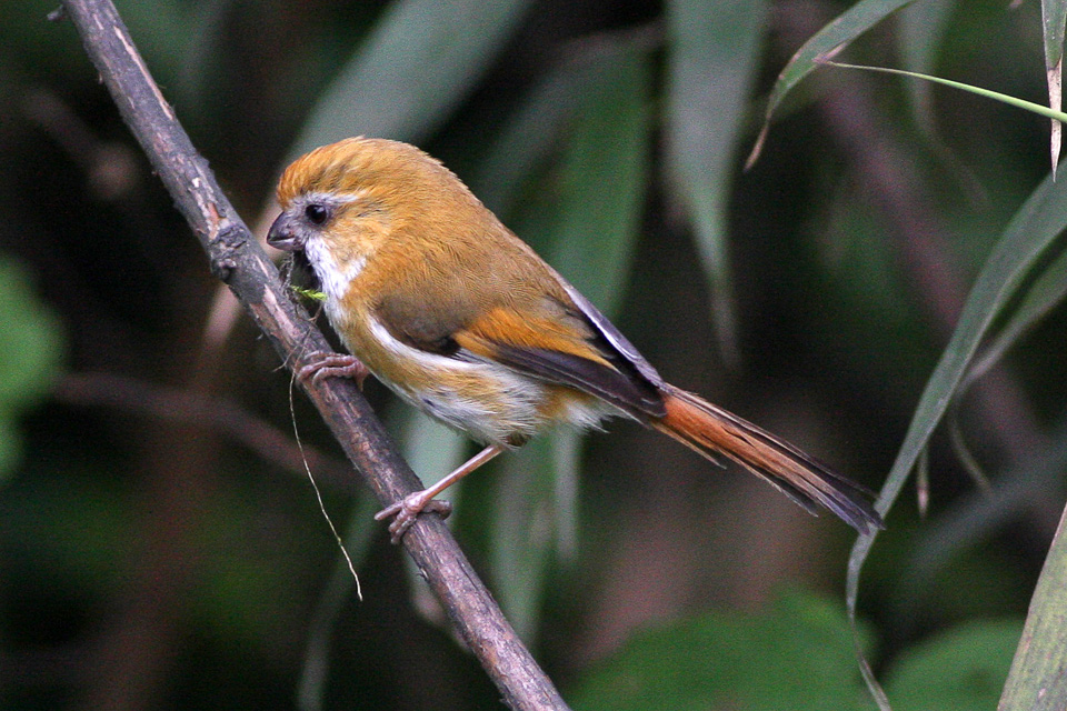 Wawu Shan, Sichuan